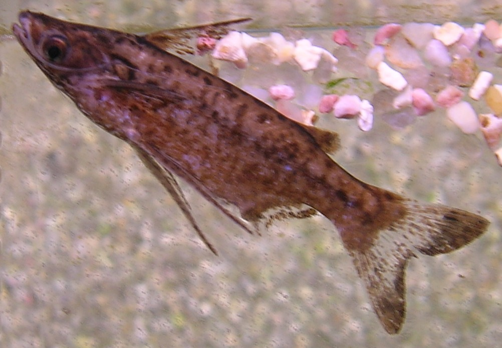 Entomocorus radiosus in an aquarium.